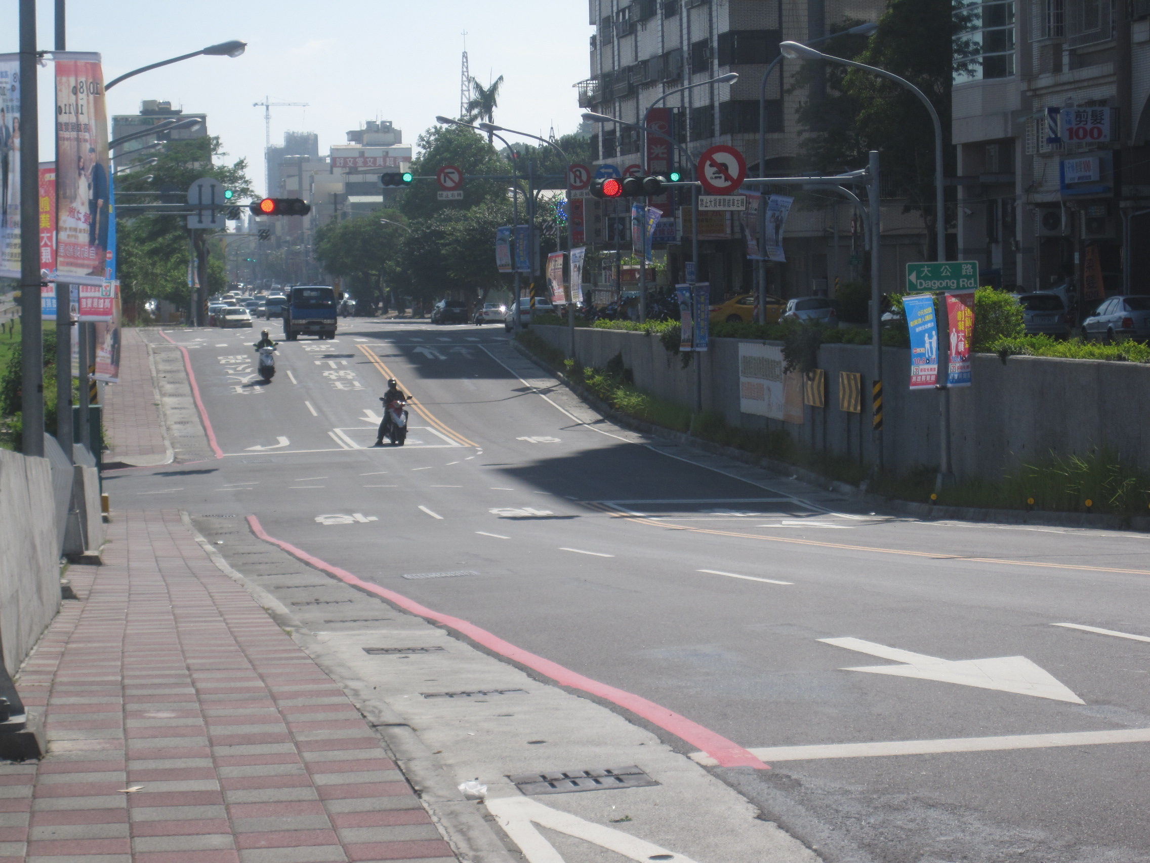 大公陸橋拆除後的樣貌。